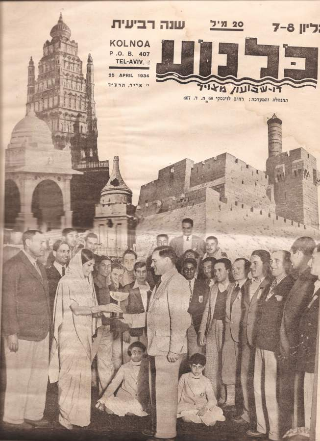 עמוד השער של עיתון "כלנוע". מתחת לשם העיתון רשומה כתובת ההנהלה והמערכת ברחוב לוינסקי 69. נסרק ע"י אורה ספיר.